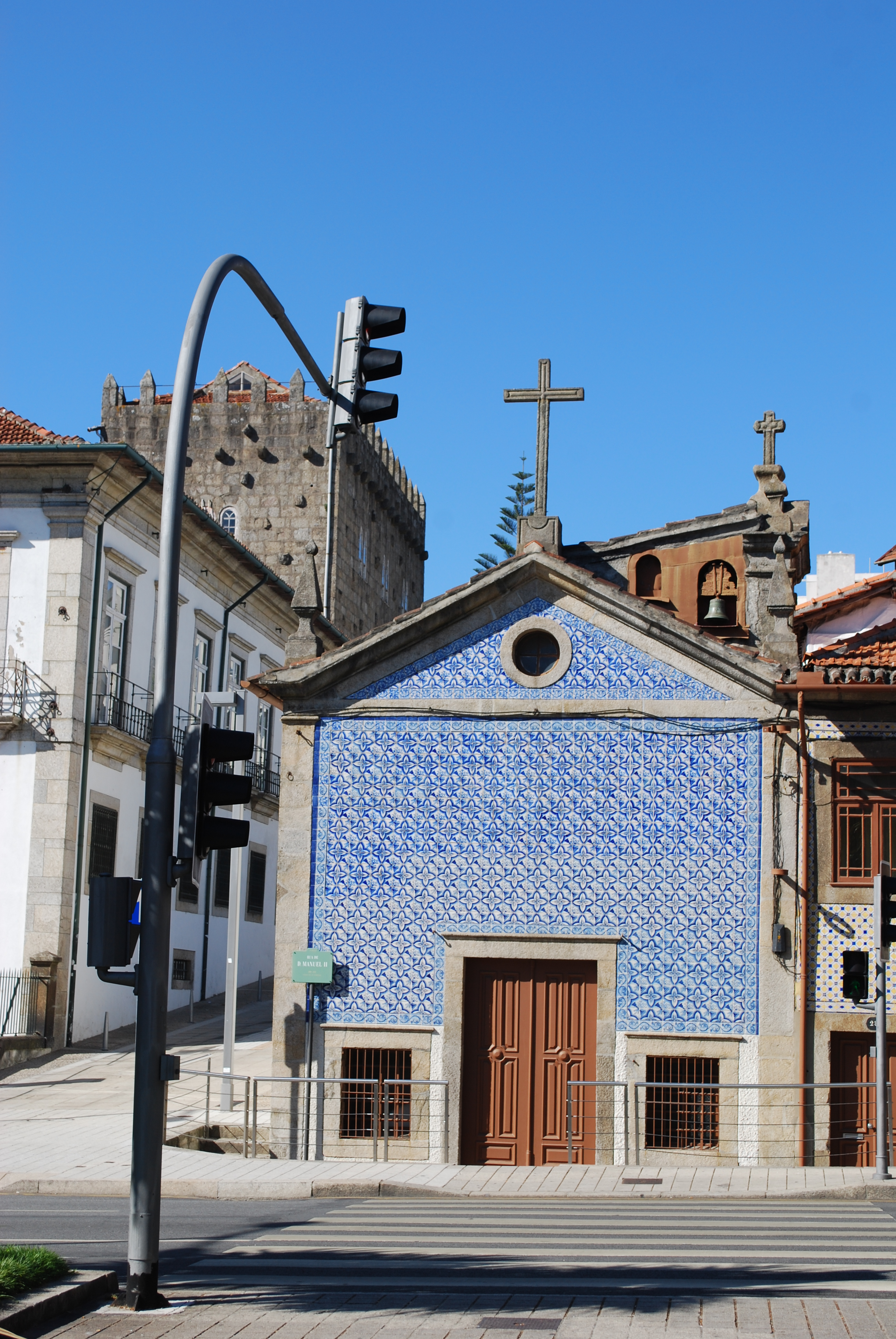 Capela do Senhor Jesus da Boa-Nova / Capela do Senhor da Boa-Nova / Capela da Torre da Marca This file was uploaded for Wiki Loves Monuments in Portugal with the unique identifier 97008797.